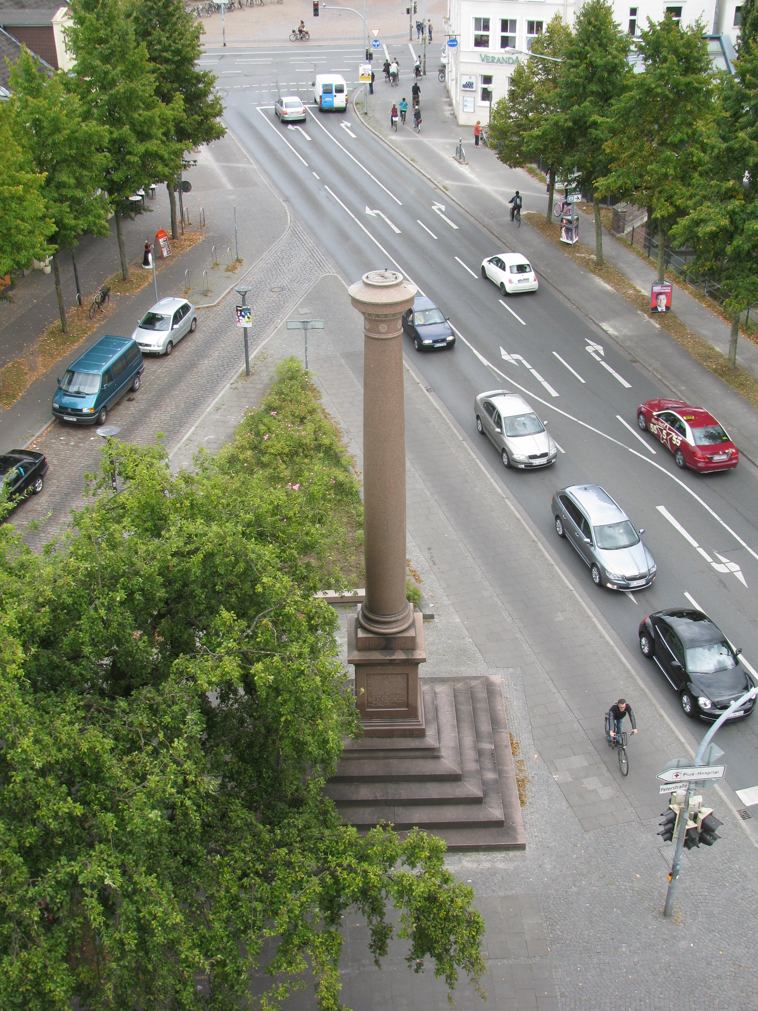 Oldenburg (Oldenburg). Blick vom Dachreiter der Friedenskirche auf den Friedensplatz, die Friedenssäule und die Ofener Straße. Die Säule stammt von 1878 und erinnert an die Gefallenen des Krieges von 1870/71.